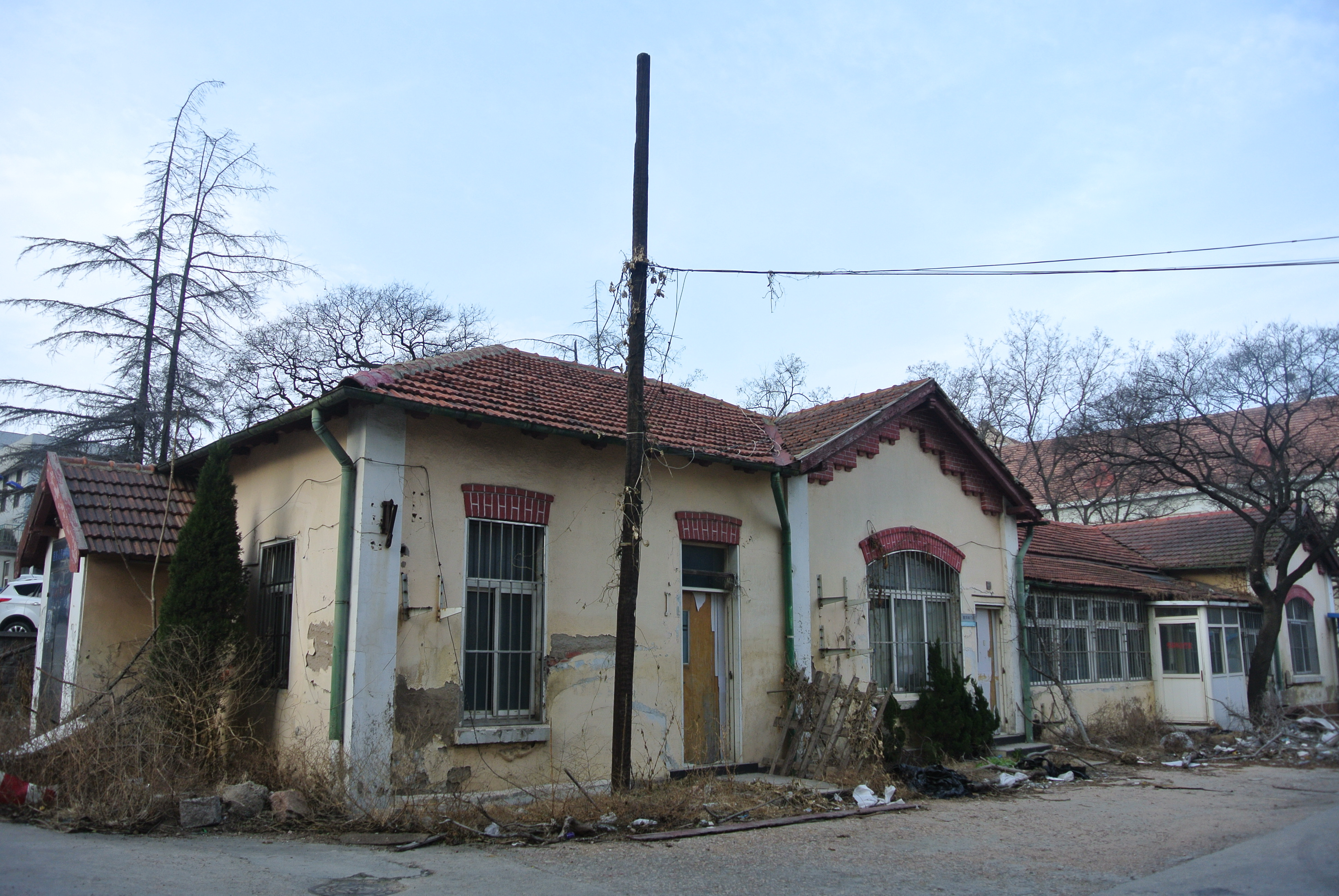 青岛花之安医院旧址